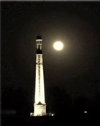 Antigua Chimenea de La Mercedes, iluminada de noche.